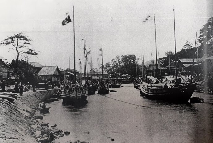 京都府竹野郡網野町（現・京丹後市）の浅茂川港。